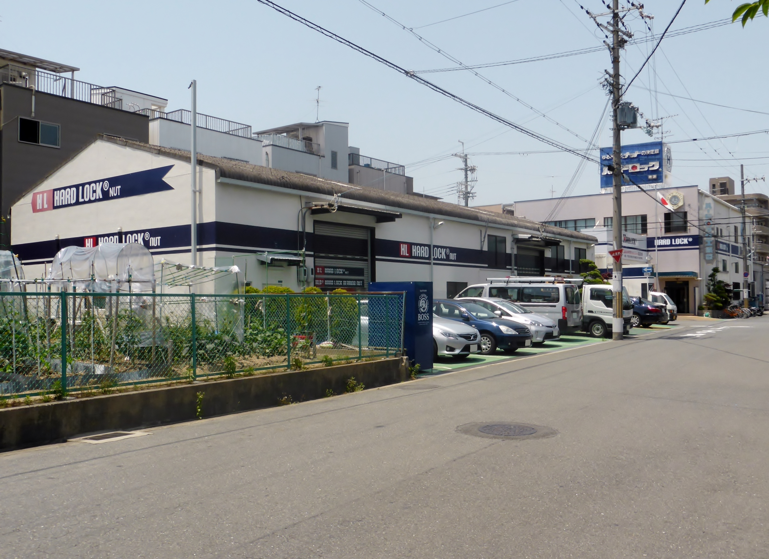 ハードロック工業株式会社本社を撮影。